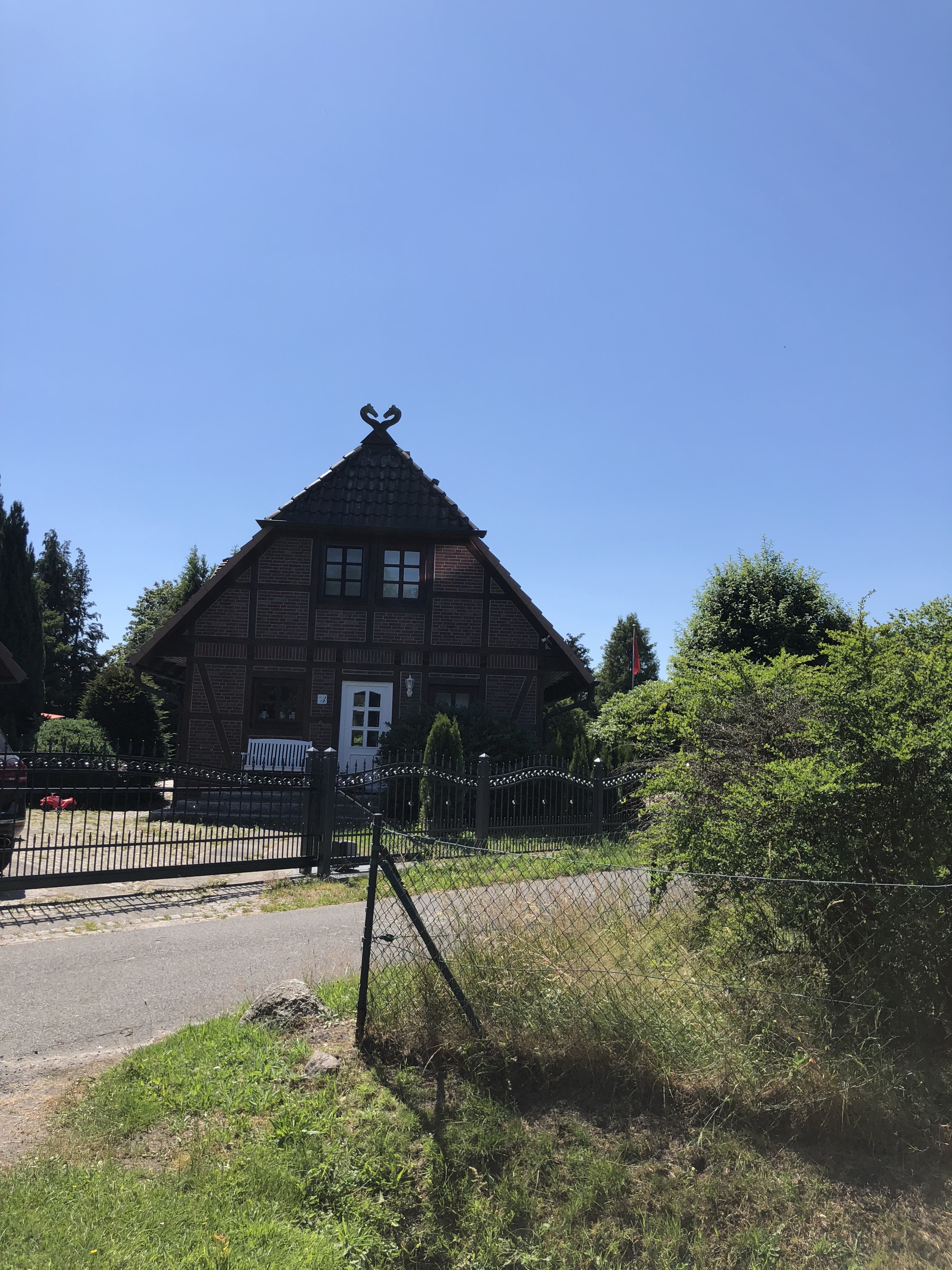 Huus in Ramshuus